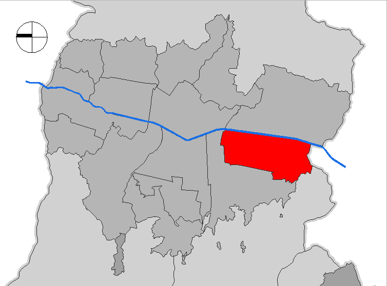 mapa de la comuna . Medellín, Colombia.